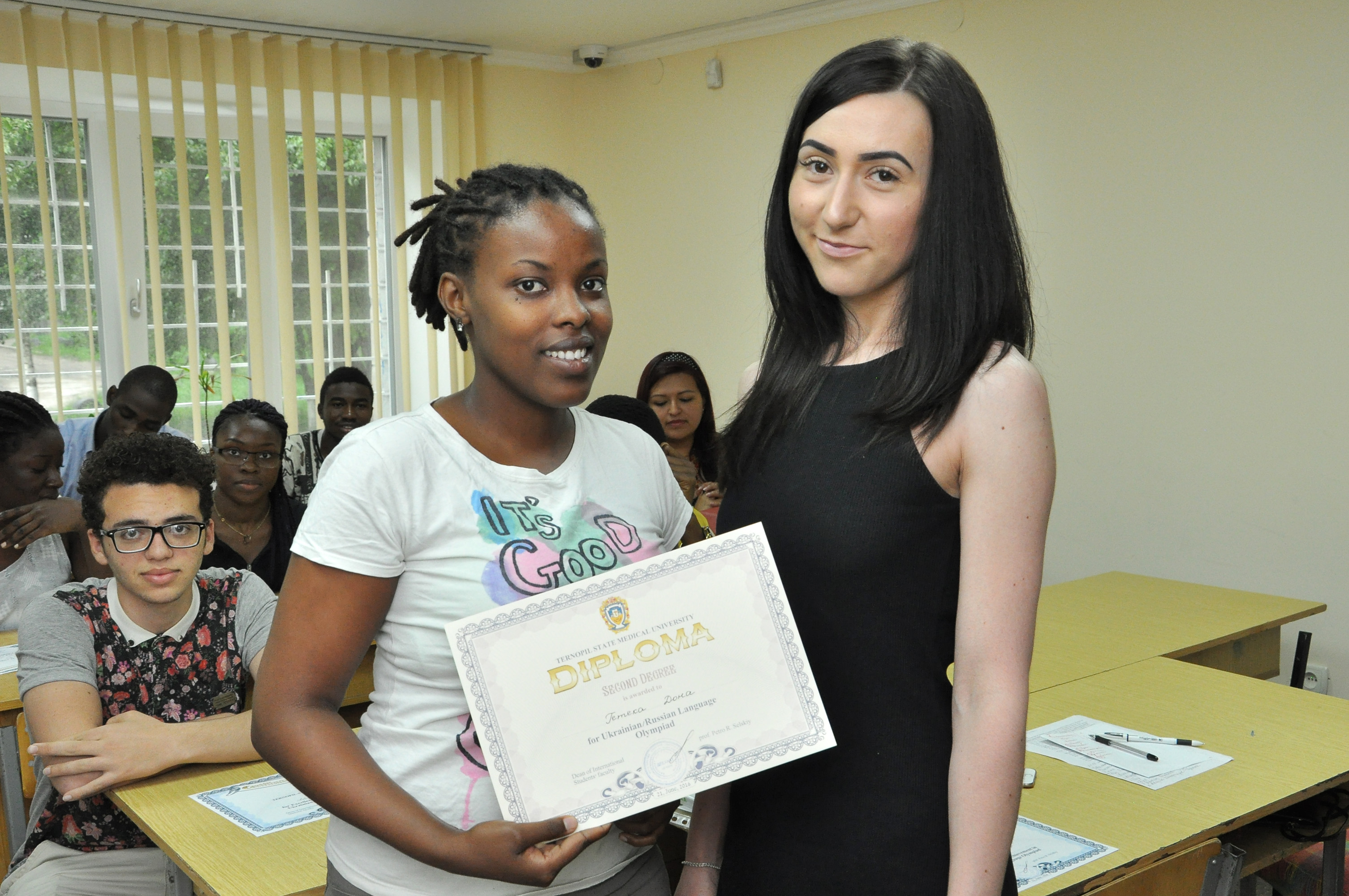 Вручення дипломів слухачам підготовчого відділення для іноземців та осіб без громадянства Тернопільського державного медичного університету імені І. Я. Горбачевського. Диплом Гетеці Дона вручає Марина Тимощук.